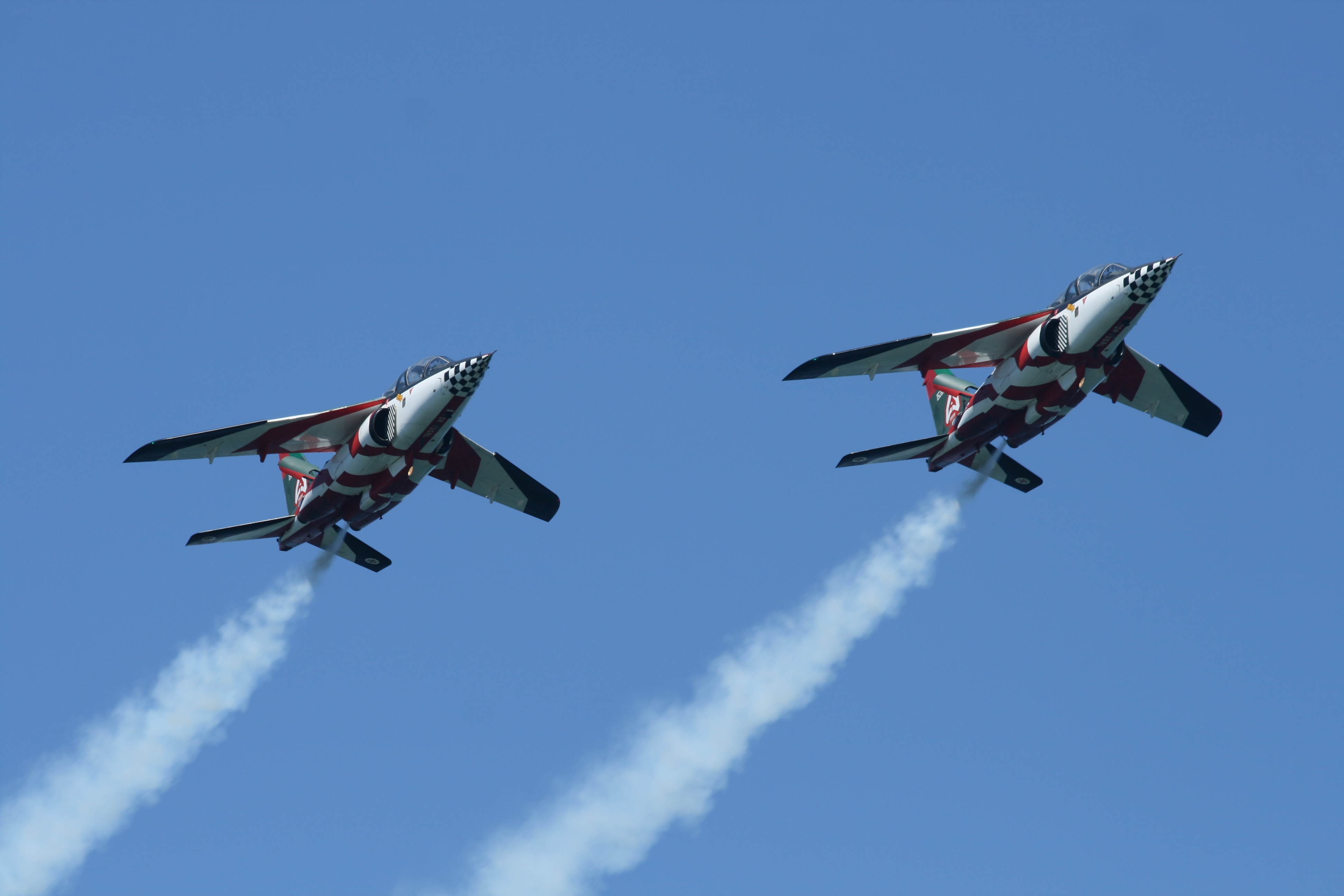 Dos Dassault / Dornier Alpha Jet E de la patrulla Asas de Portugal de la Fuerza Aérea Portuguesa, durante el Festival Aéreo de Vigo (Galicia, España) Asas de Portugal. Two Dassault / Dornier Alpha Jet E of the patrol Asas de Portugal of the Air Portuguese Force, during the Air Festival of Vigo (Galicia, Spain)